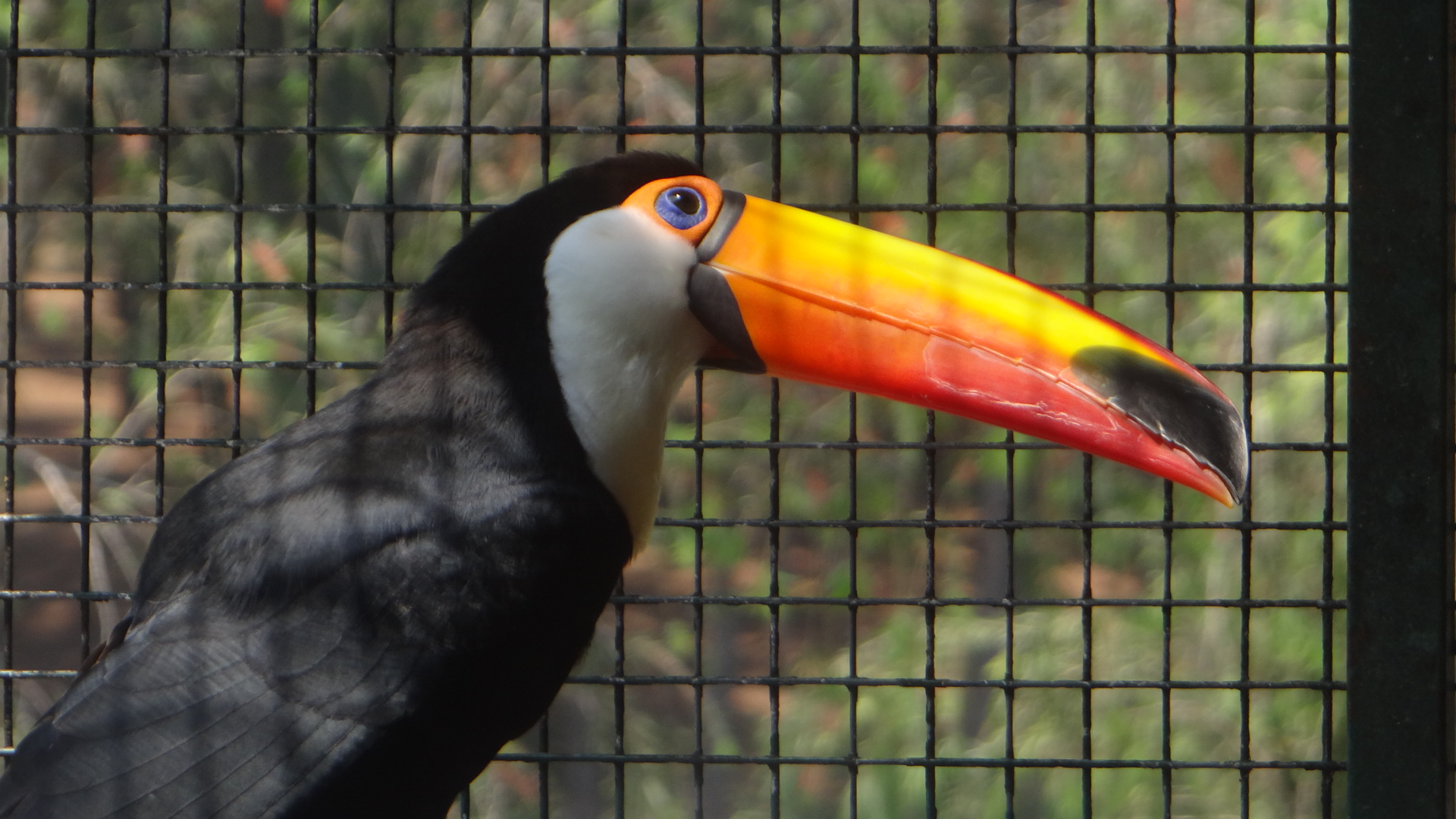 Uma beleza de perfil